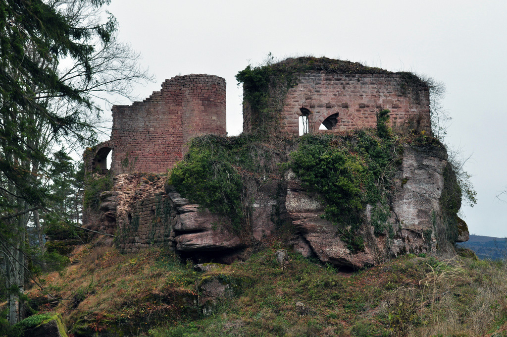 Une partie du Dreistein vue depuis l'autre morceau